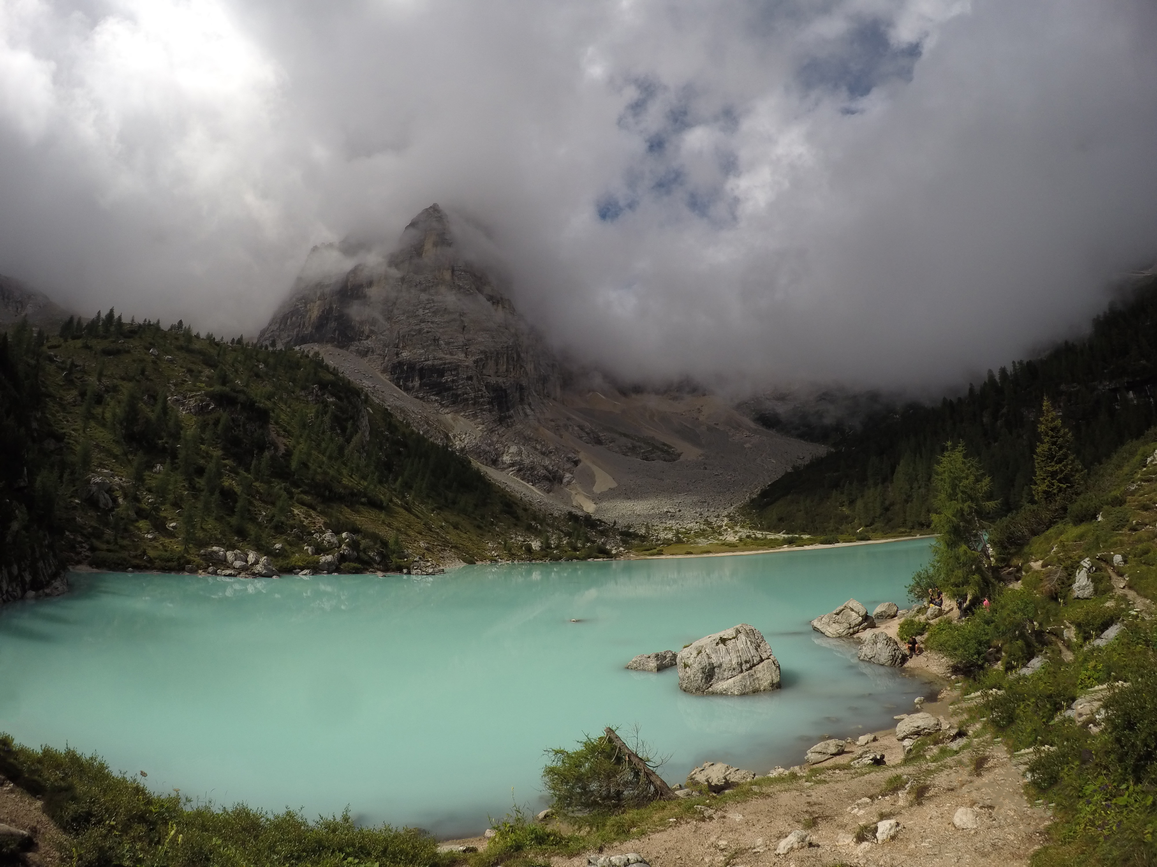 Gruppo Antelao - Marmarole - Sorapis (Q47494810)